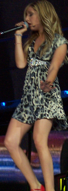 What I've Been Looking For